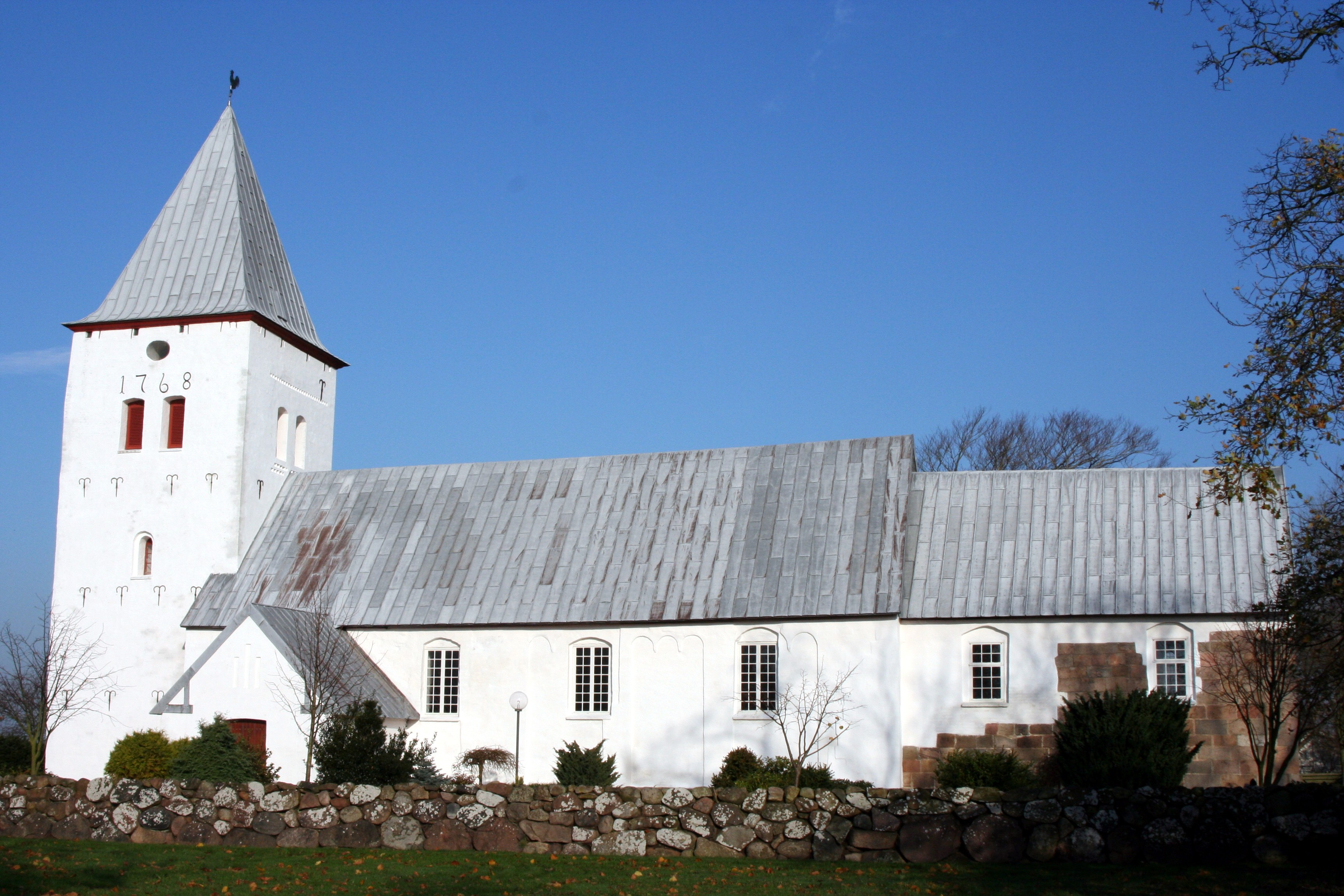 Darum Kirke, Darum Sogn, Ribe stift